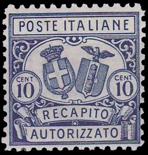 Первая доставочная марка Италии